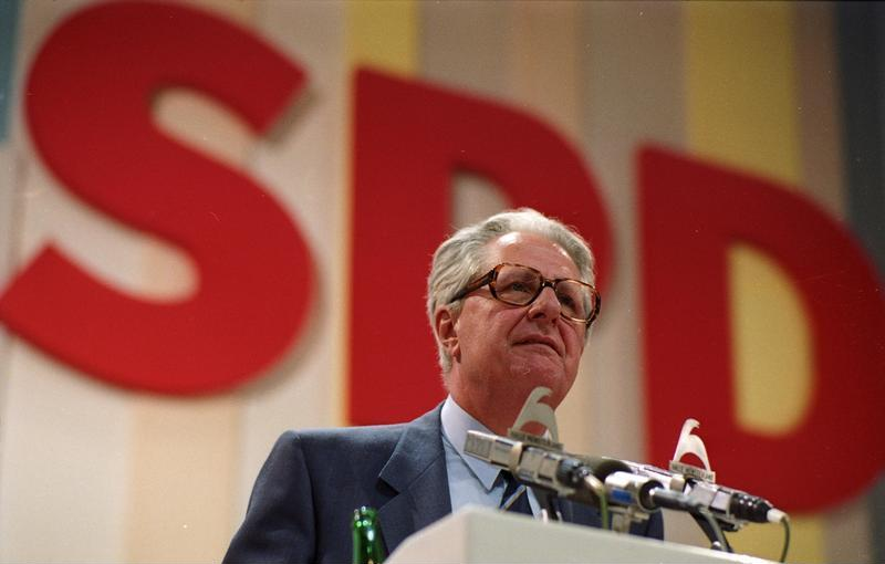 30.8.-2.9.1988 SPD-Parteitag in Münster, Halle Münsterland